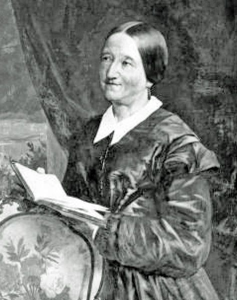 Porträtfoto Hedwig von Eberstein